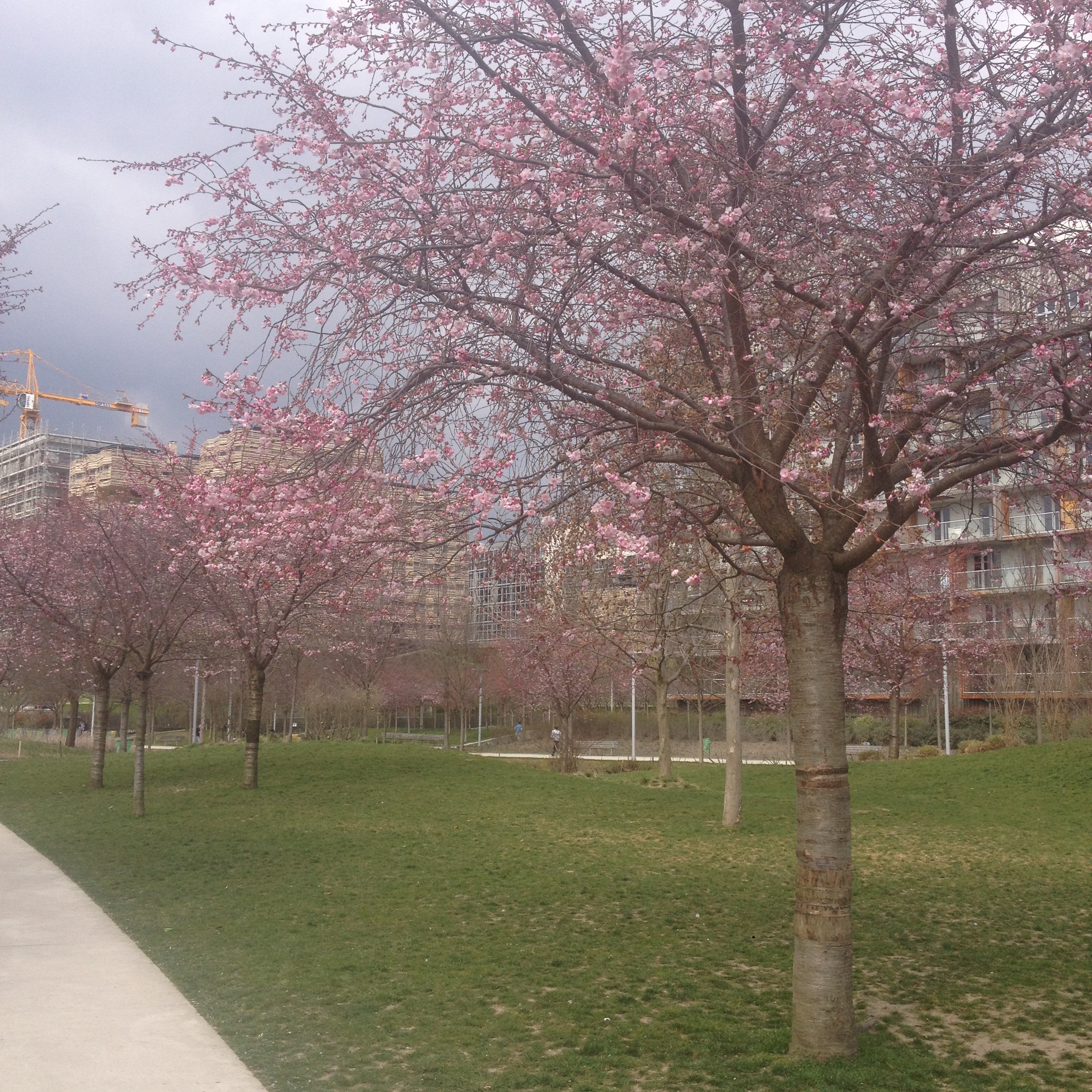 Cerisiers en fleur au Parc Martin Luther King (Clichy-Batignolles) le 22 mars 2015 à Paris Cherry blossoms at Parc Martin Luther King (Clichy-Batignolles) in Paris, on March 22nd, 2015